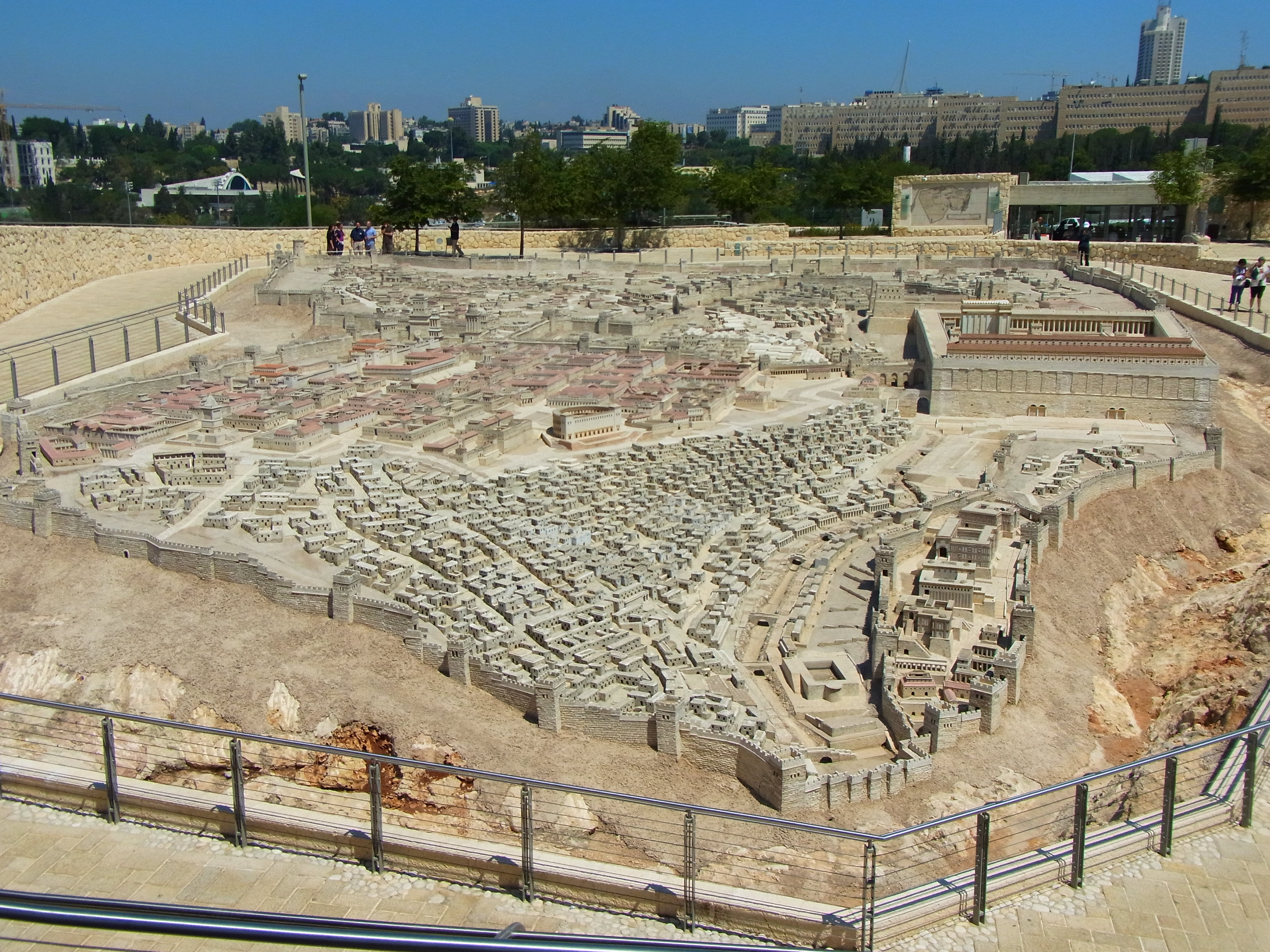 中文（香港）: 耶路撒冷復古模型